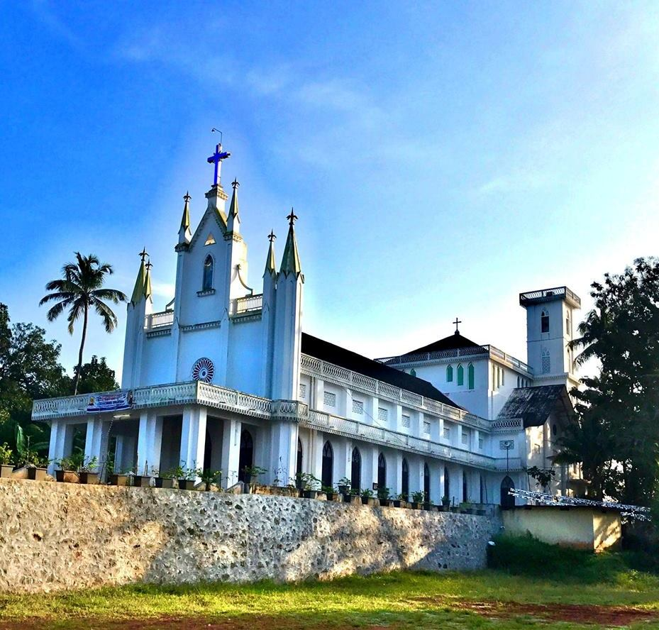 സെൻറ് മേരീസ് റോസറി പള്ളി, കാരൂർ